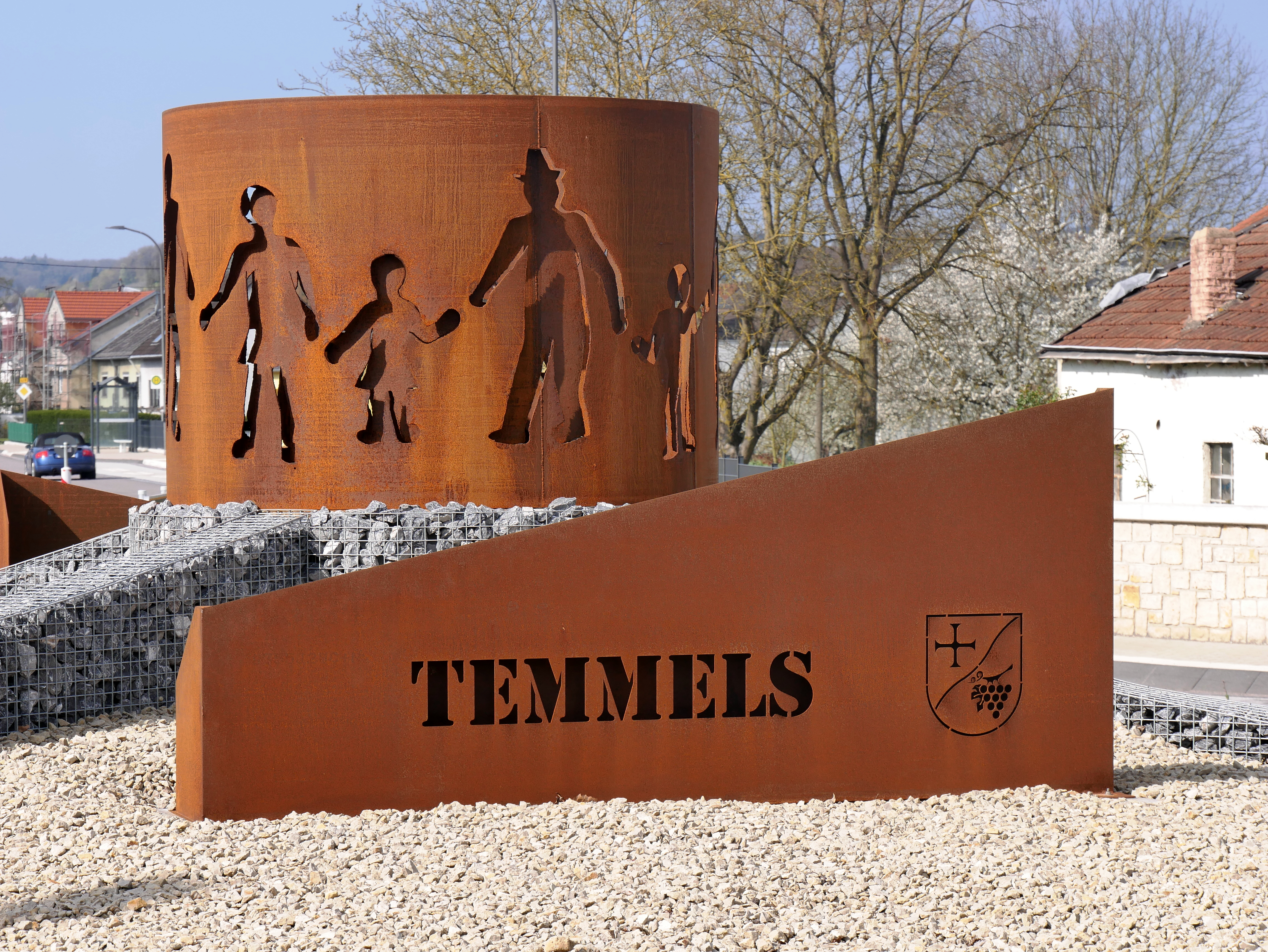 Kreisverkehr (von 2018) in Temmels an der Obermosel. Eisenskulptur in der Mitte des Kreisverkehrs an der Kreuzung der B 419 mit der L 136 und der Kirchstraße.